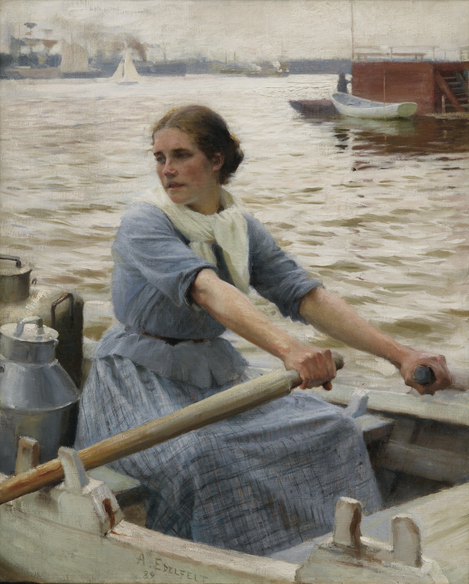 La laitière